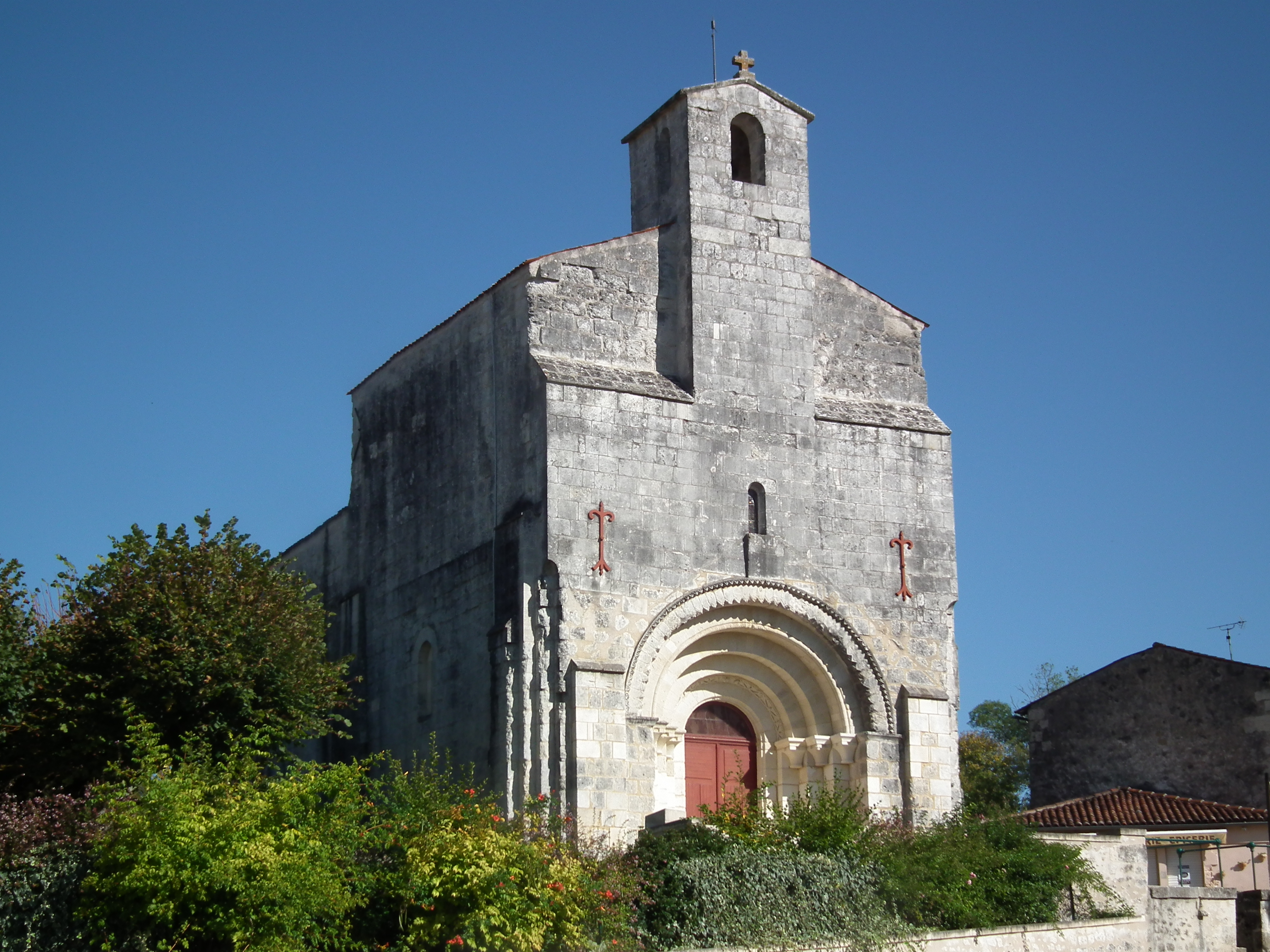 L'église romane de Fontcouverte